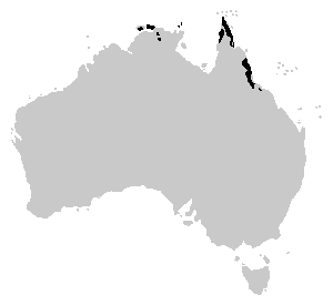 domaine de distribution grenouille Austrochaperina